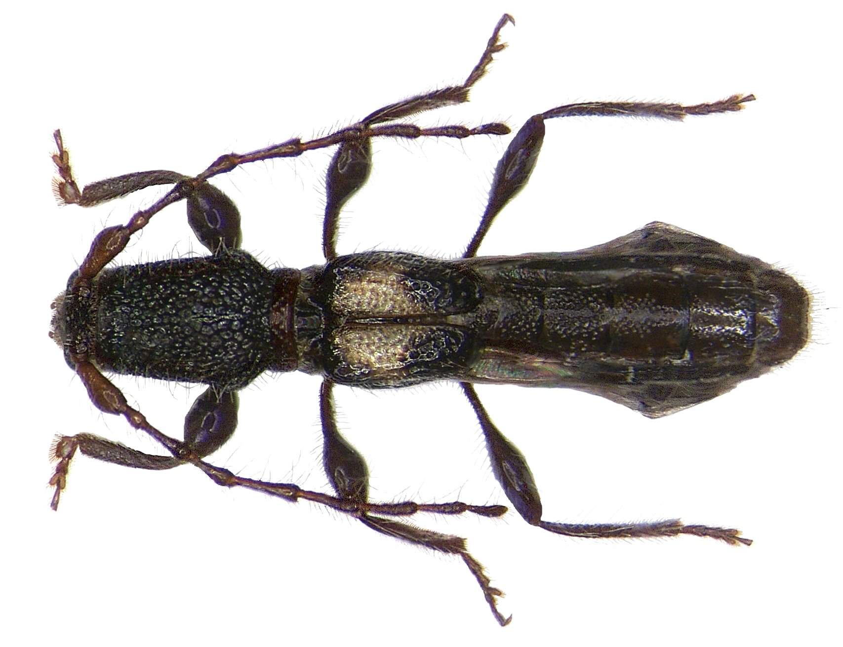 Familie: Cerambycidae Groesse. 5,7 mm Fundort: Indonesien, N-Molukken, Ternate leg. A.Skale, 2006; det. A.Weigel, 2006 Photo: U.Schmidt, 2006